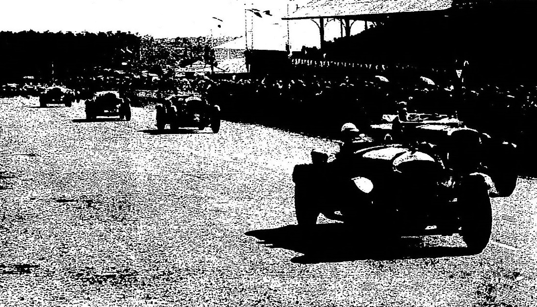 Départ des 24 Heures du Mans 1930 (1er plan la Bentley n°2 de Frank Clement et Richard Watney, 2e au final)